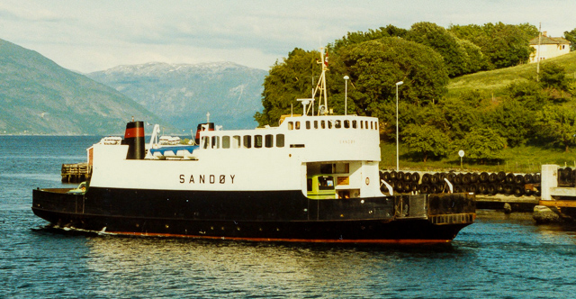 MF “Sandøy” ved Vangsnes fergekai i 1987